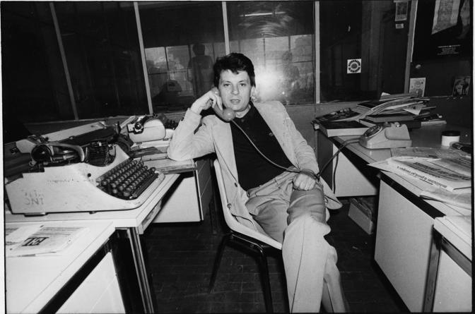 Foto di Adriano Sofri, storico Leader di Lotta Continua